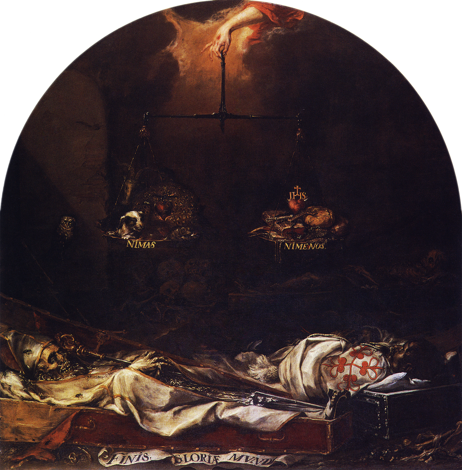 Esta obra, junto con la que lleva por título In ictu oculi, le fue encargada a Juan de Valdés Leal para ser colocada en el sotocoro del Hospital de la Caridad de Sevilla, y al igual que en las pinturas del género Vanitas, aluden a la banalidad de la vida terrena y a la universalidad de la muerte, aunque también quedan unidas con el fin primordial de la Hermandad de la Caridad de Sevilla, que era el de enterrar a los ajusticiados e indigentes de la ciudad, al igual que otras hermandades similares existentes en España en esa época.